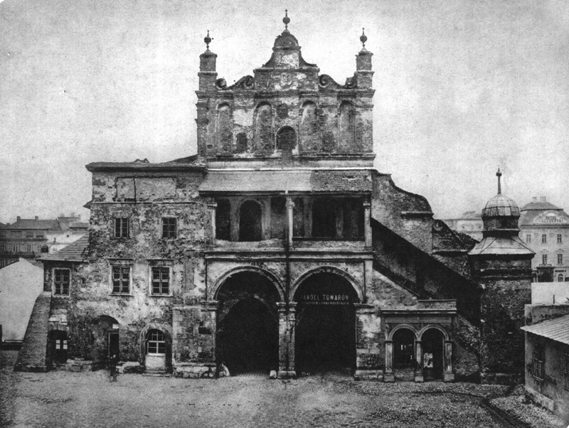 Południowa fasada Sukiennic. Widok od ul. Brackiej. Po lewej widoczny budynek "Postrzygalni" - fot. około 1870 r.